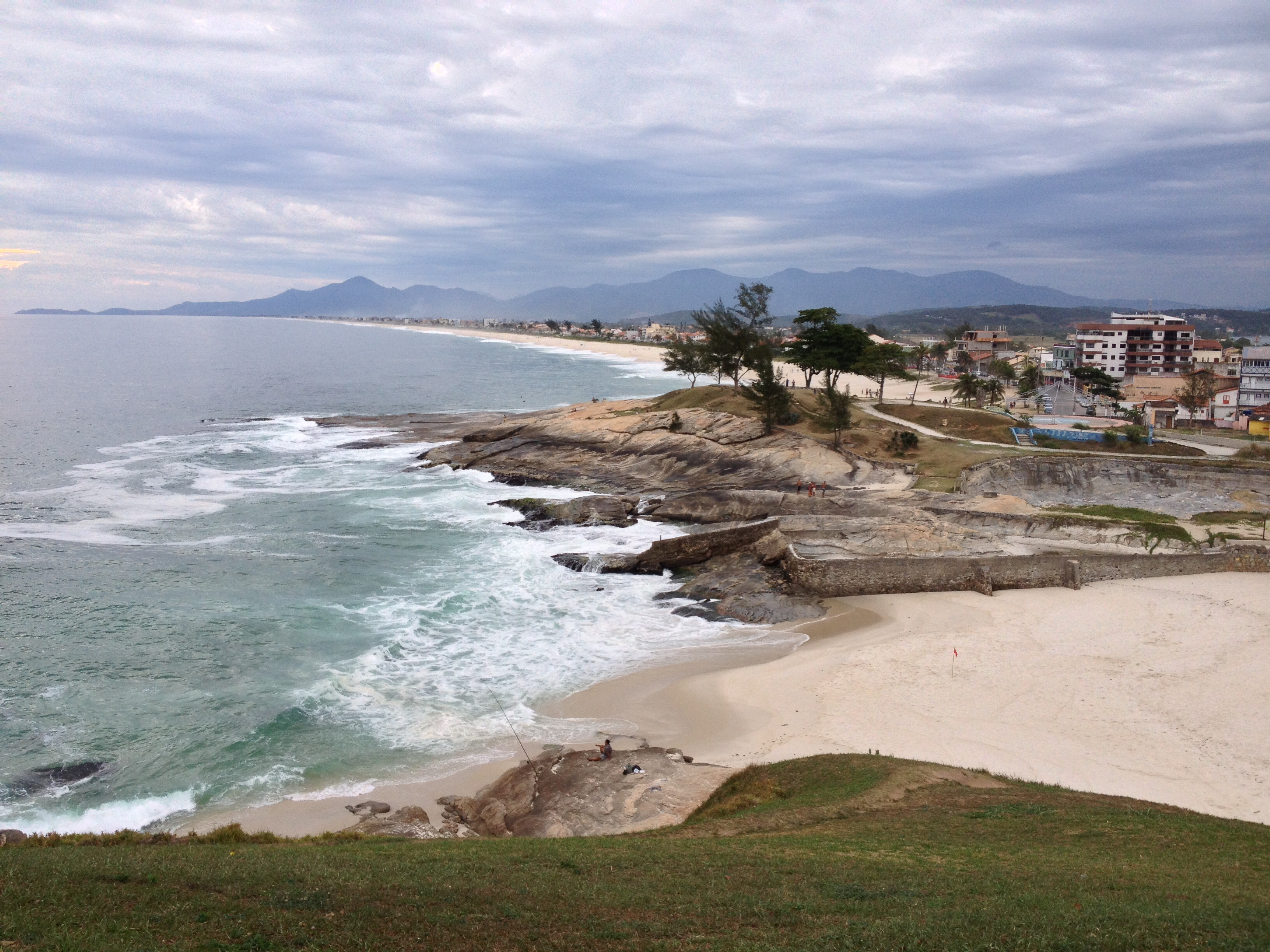 Praia da Vila, Saquarema RJ, alto do morro da igreja Nossa Senhora de Nazareth.